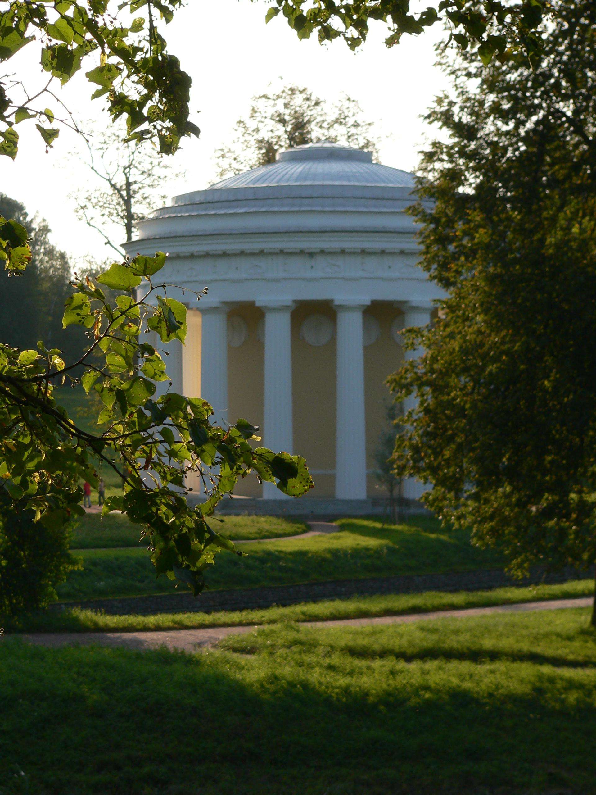 Храм Дружбы в Павловском парке.